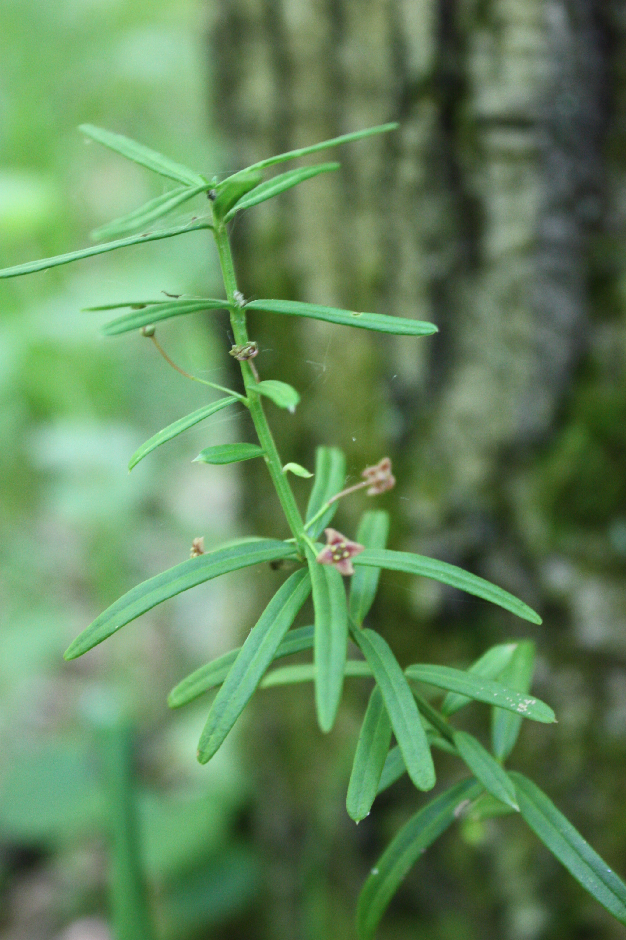 «Кармелюкове Поділля», Чечельницький район Бондурівська, Бритавська, Вербська, Демівська, Куренівська, Любомирська, Лузька, Стратіївська, Тартацька, Червоногреблянська сільські ради Чечельницької селищної ради Чечельницького району Тростянецький район с. Торканівка